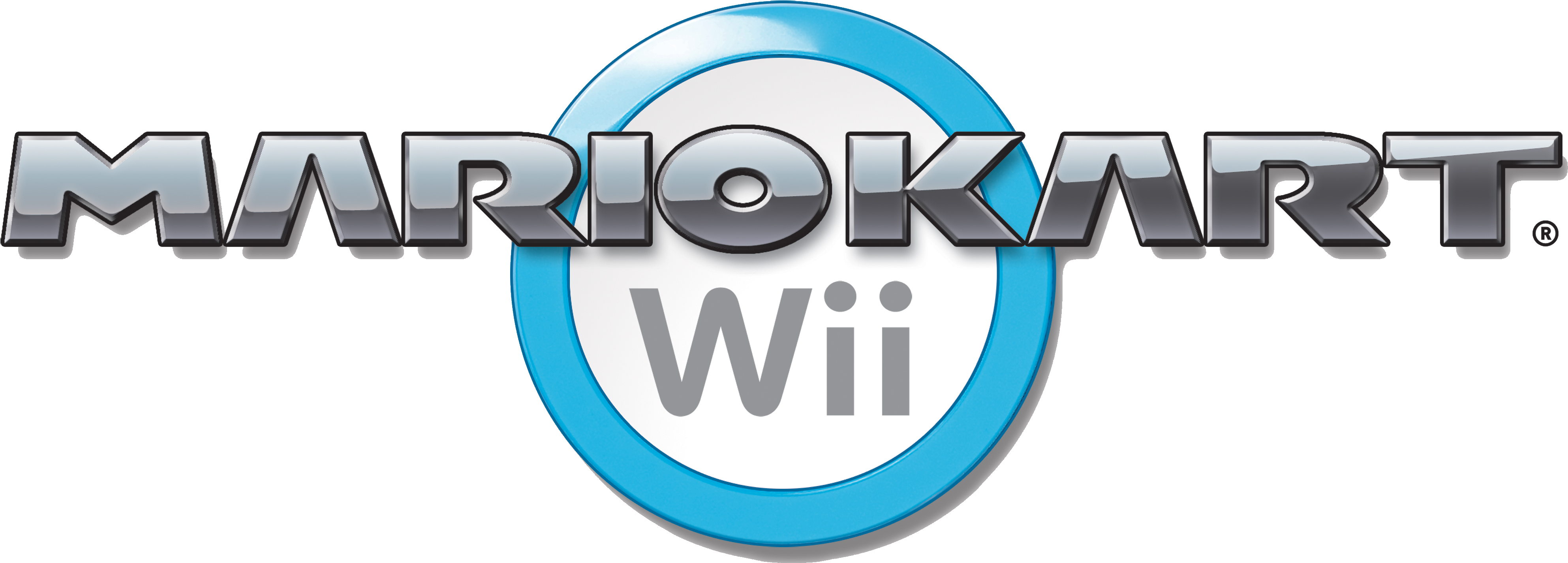 Offizielles Logo des Spiels "Mario Kart Wii"